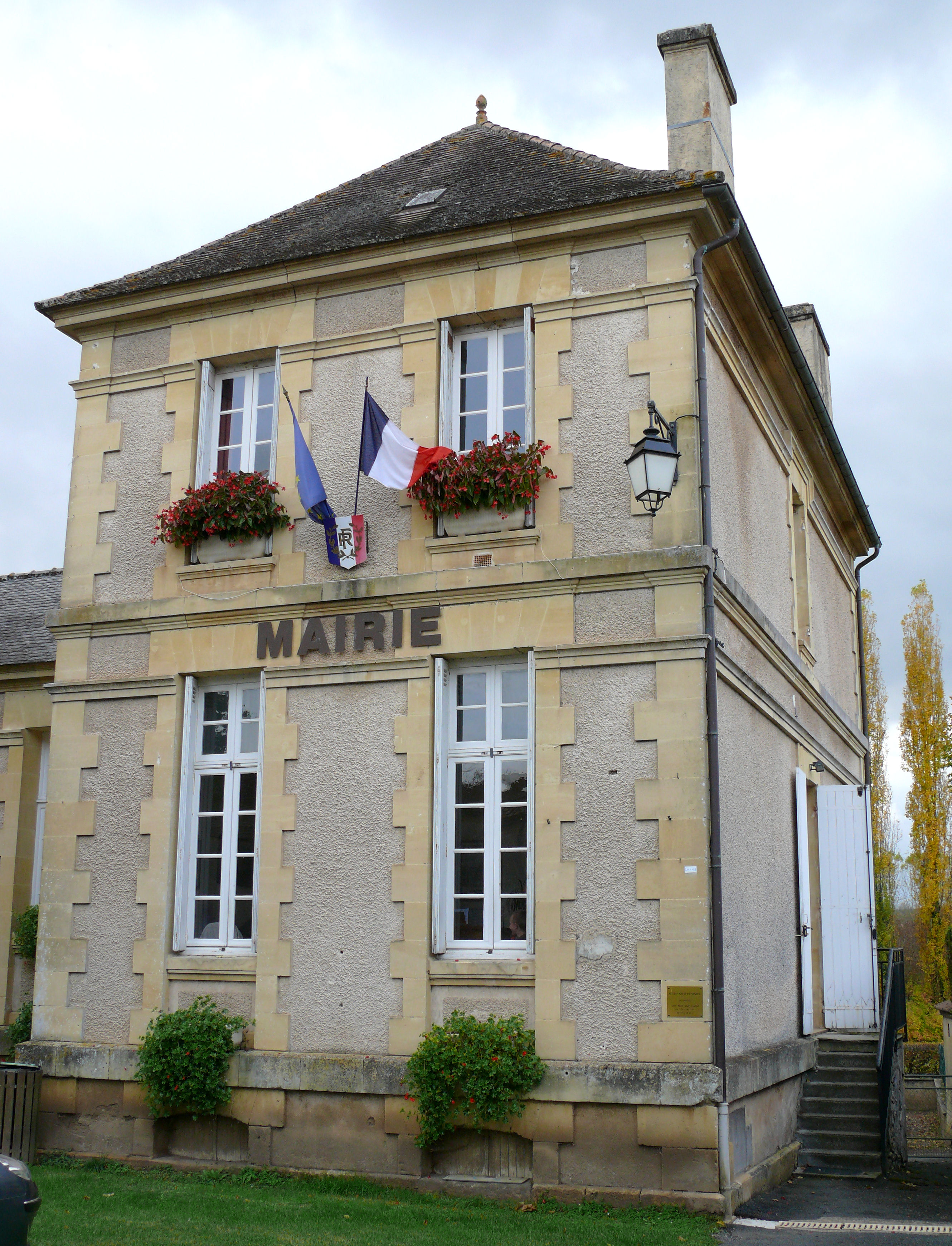 Trémolat - La mairie